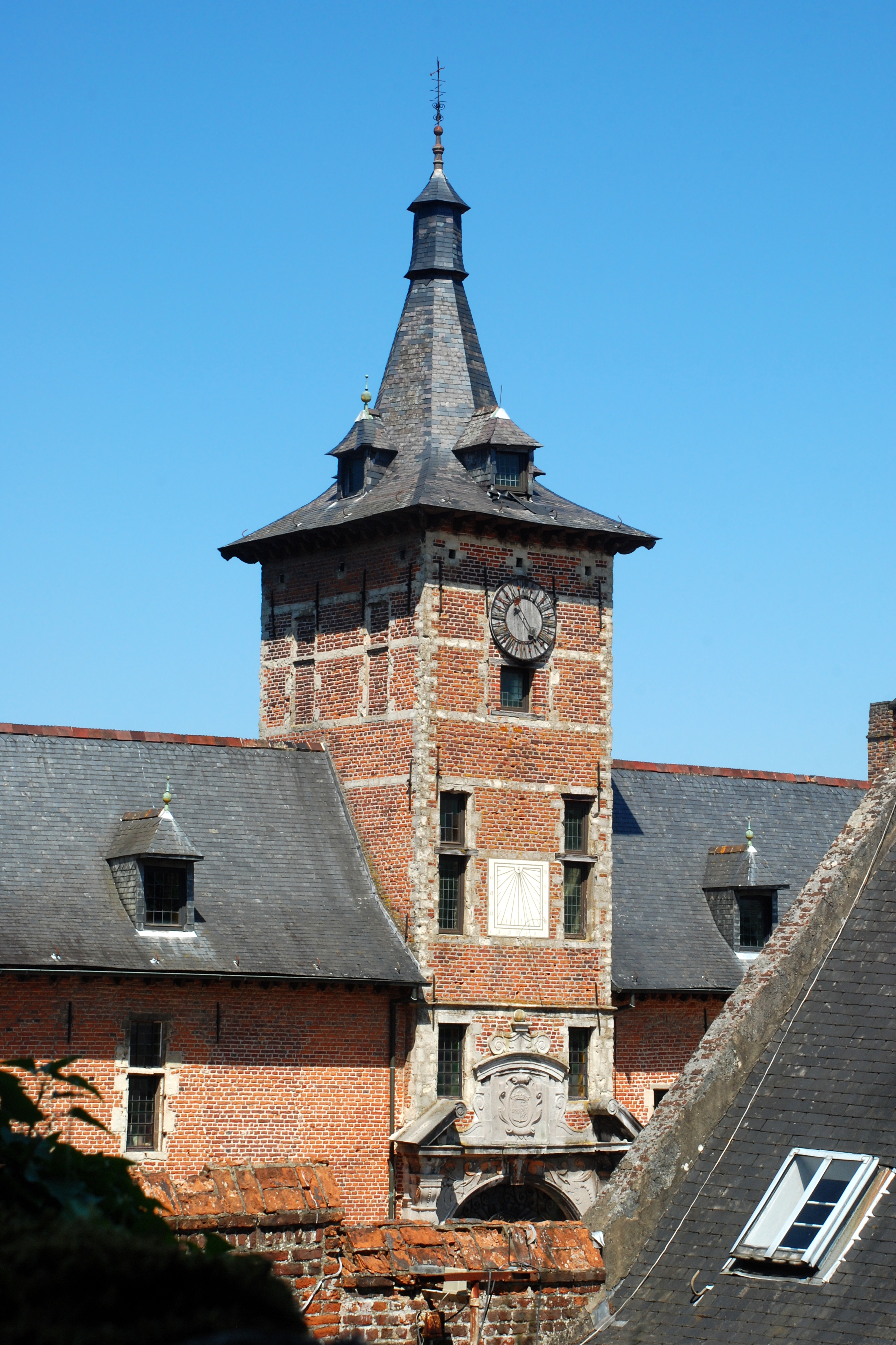 Belgique - Brabant wallon - Château de Rixensart